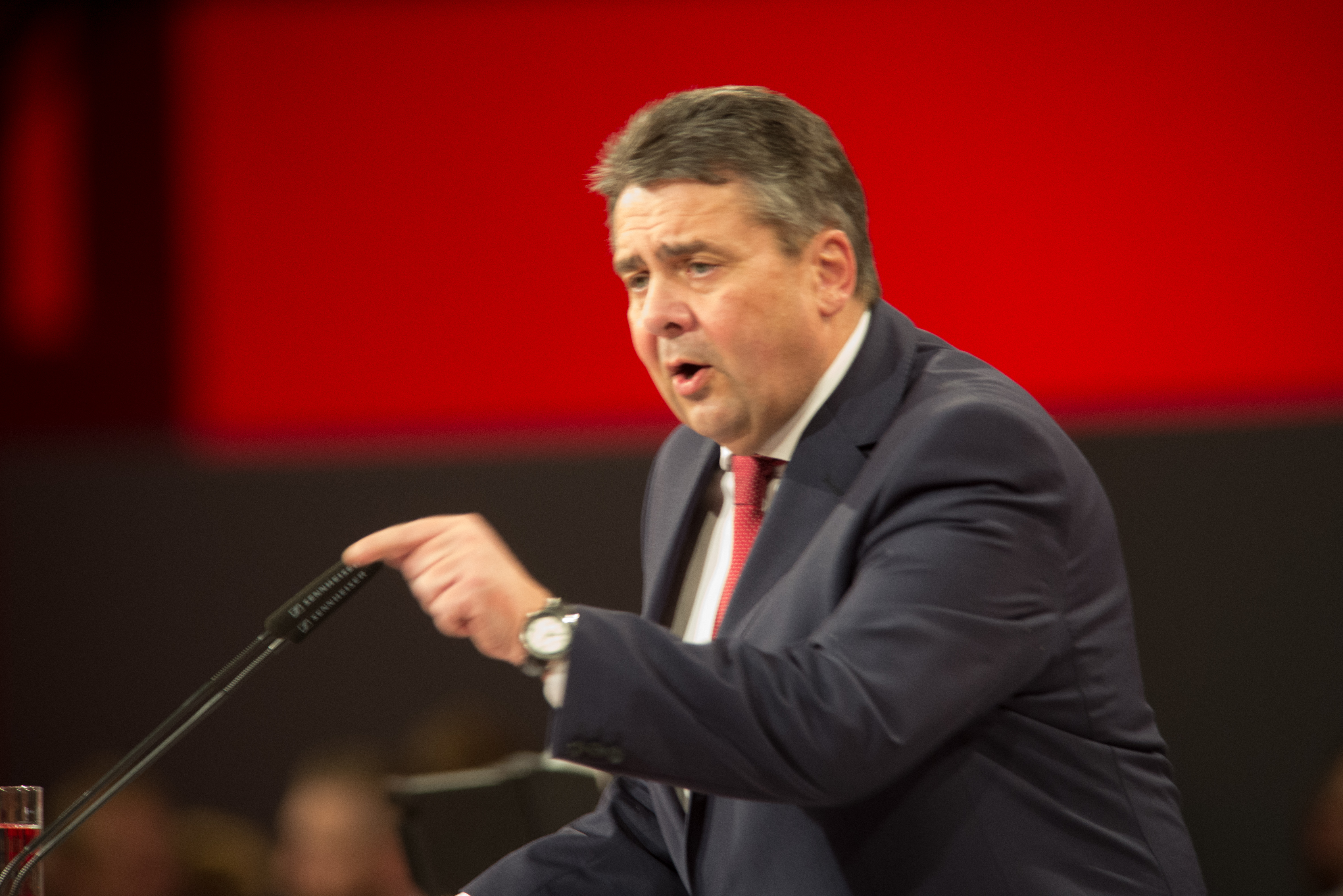 Sigmar Gabriel, SPD, auf dem SPD Bundesparteitag am 19. März 2017 in Berlin